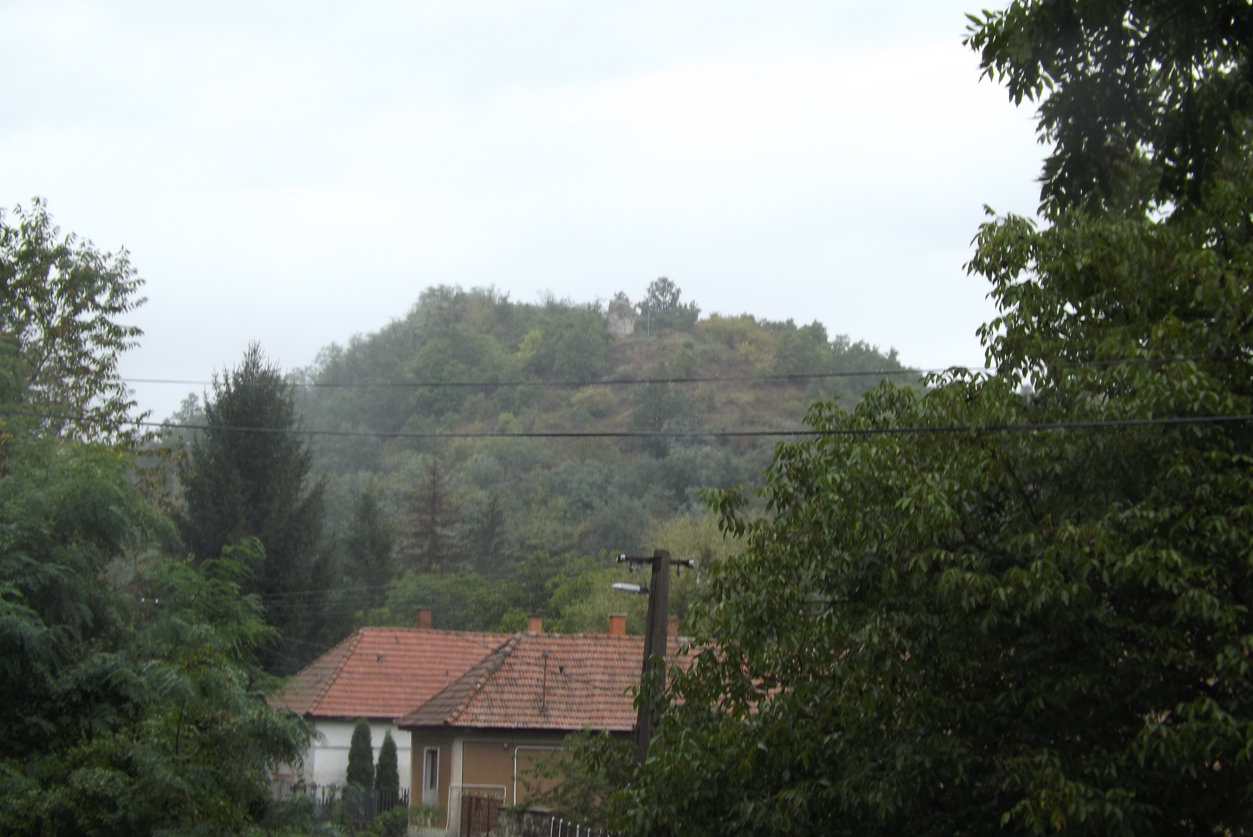 Latorpuszta házai, felettük Latorvár romjai